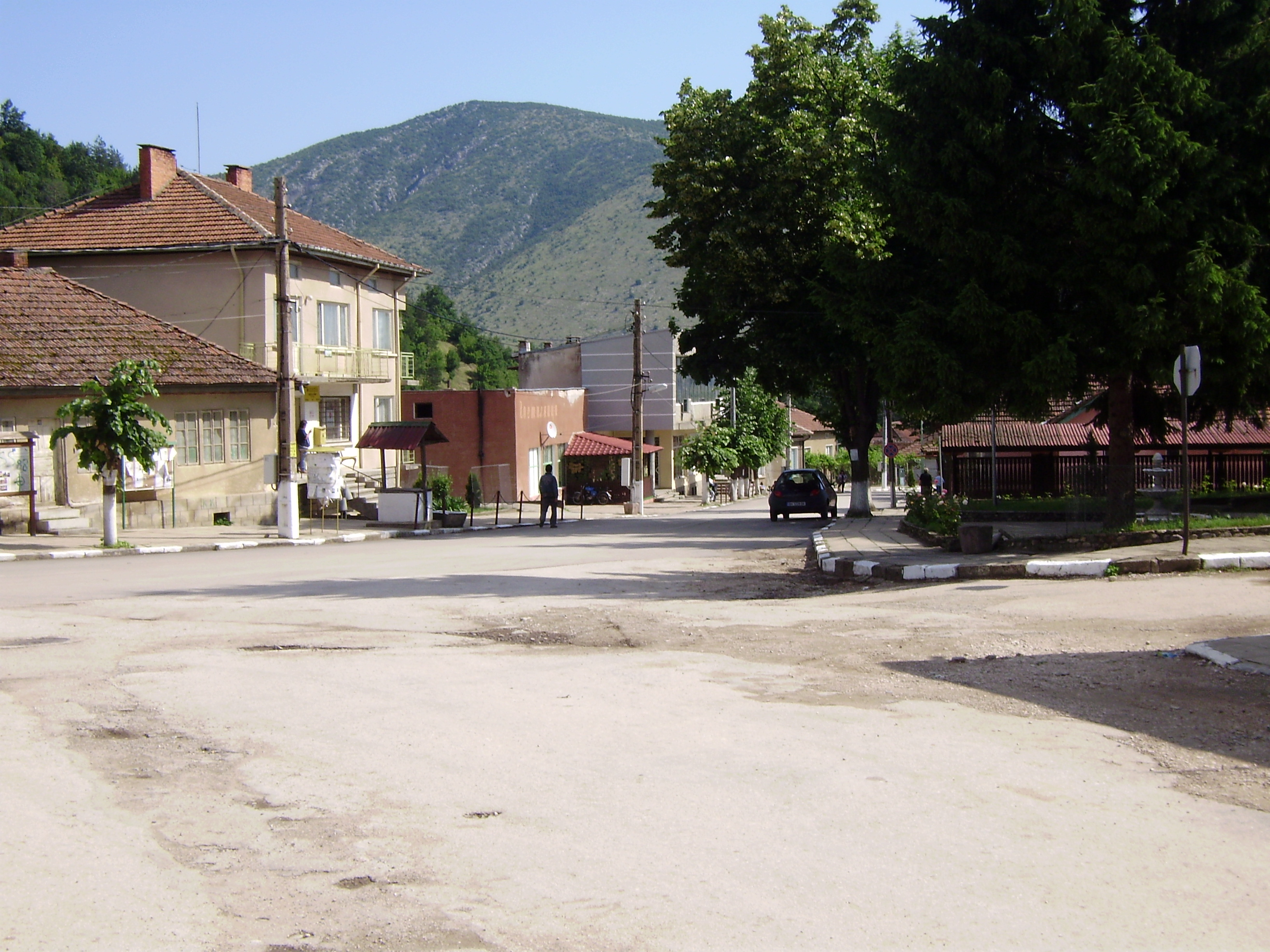 Главната улица на село Чупрене.